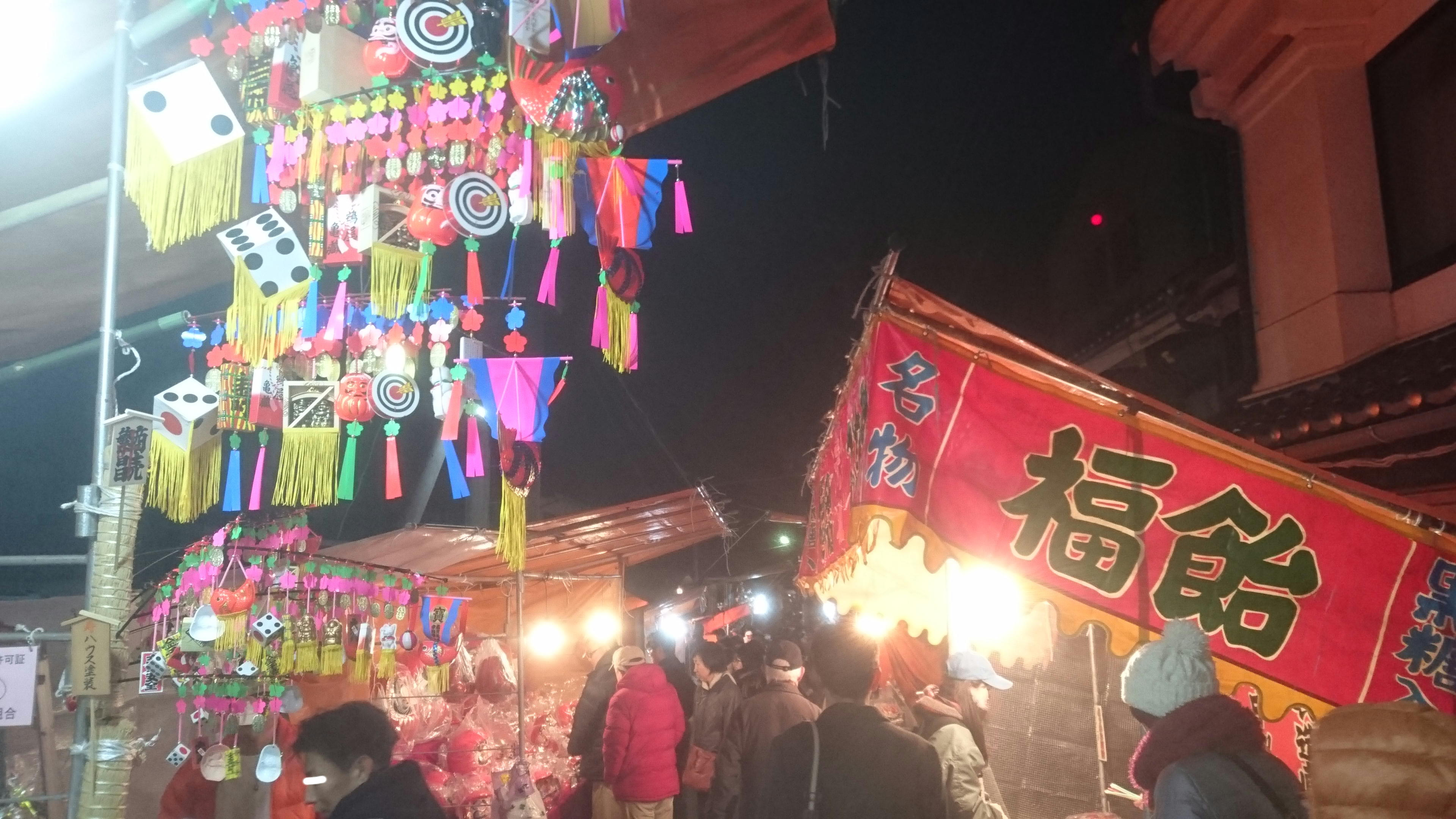 西宮神社えびす講（長野市）